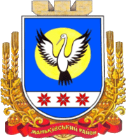 Герб Маньківського району